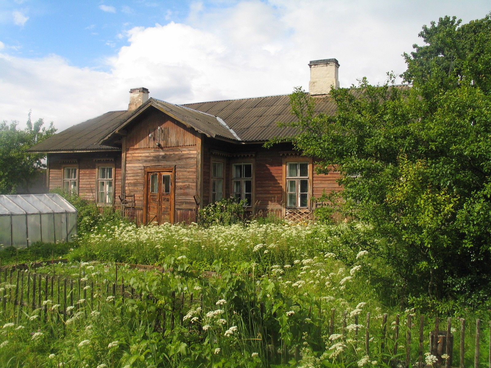 Kaagjärve jaamahoone